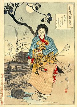 Mugai Nyodai ir įtrūkęs kibiras.